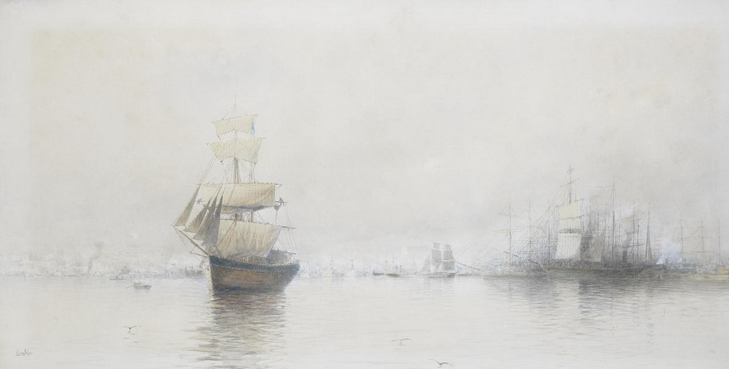 Piraeus